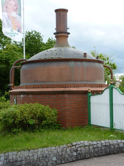 Böblingen: Schönbuchbräu